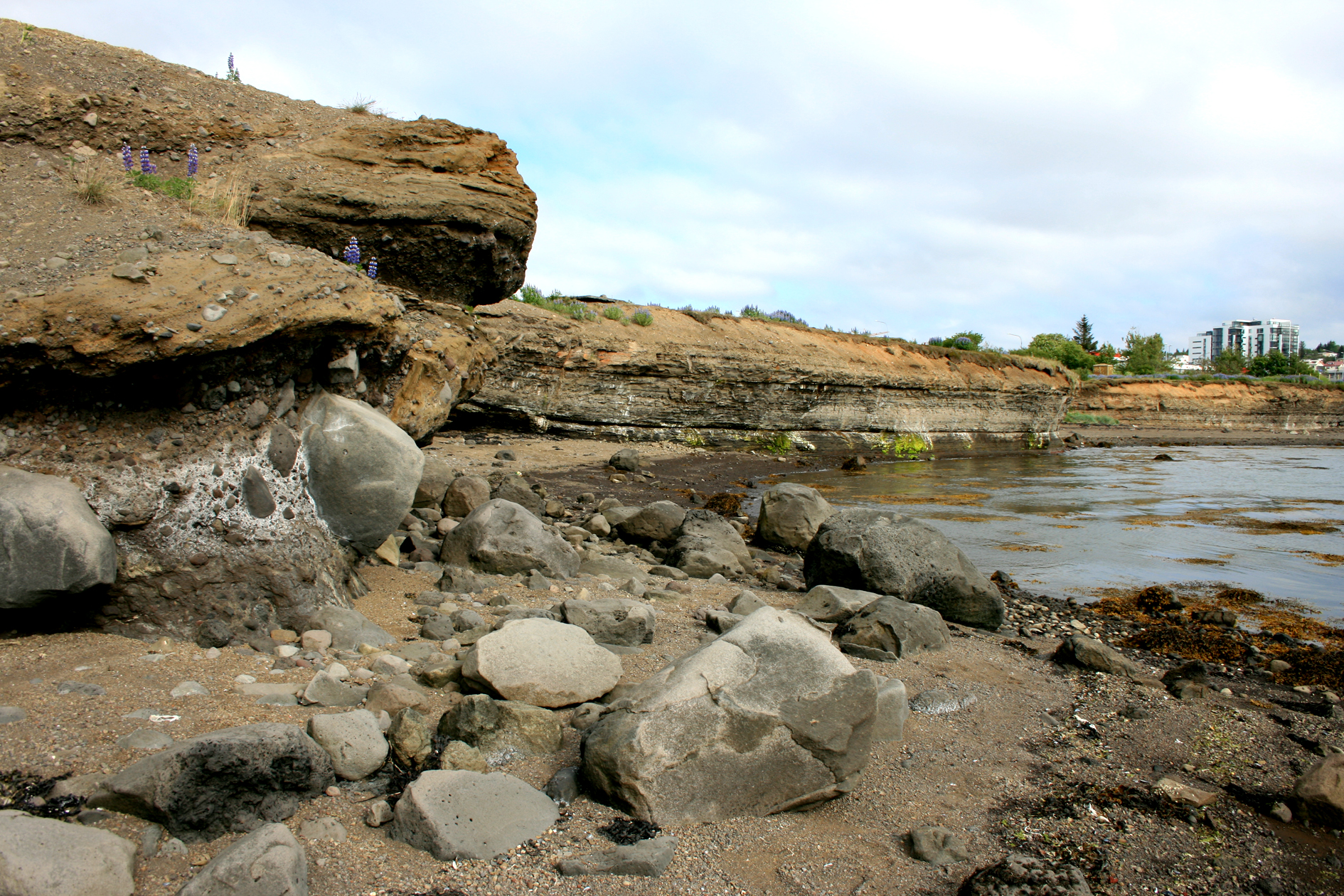 Fossvogslög innst í Fossvogi